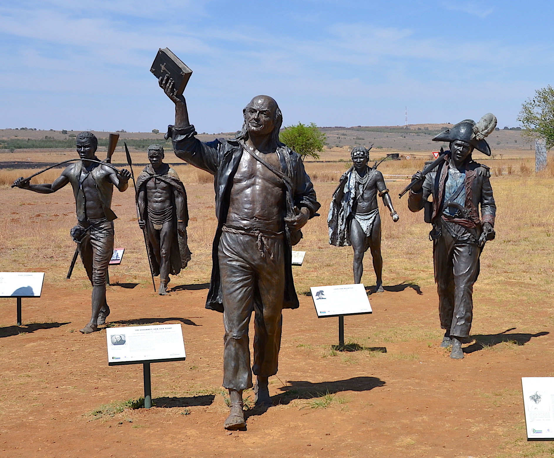 Missionar Johannes van der Kemp, Bronzefigur bei Maropeng, Südafrika